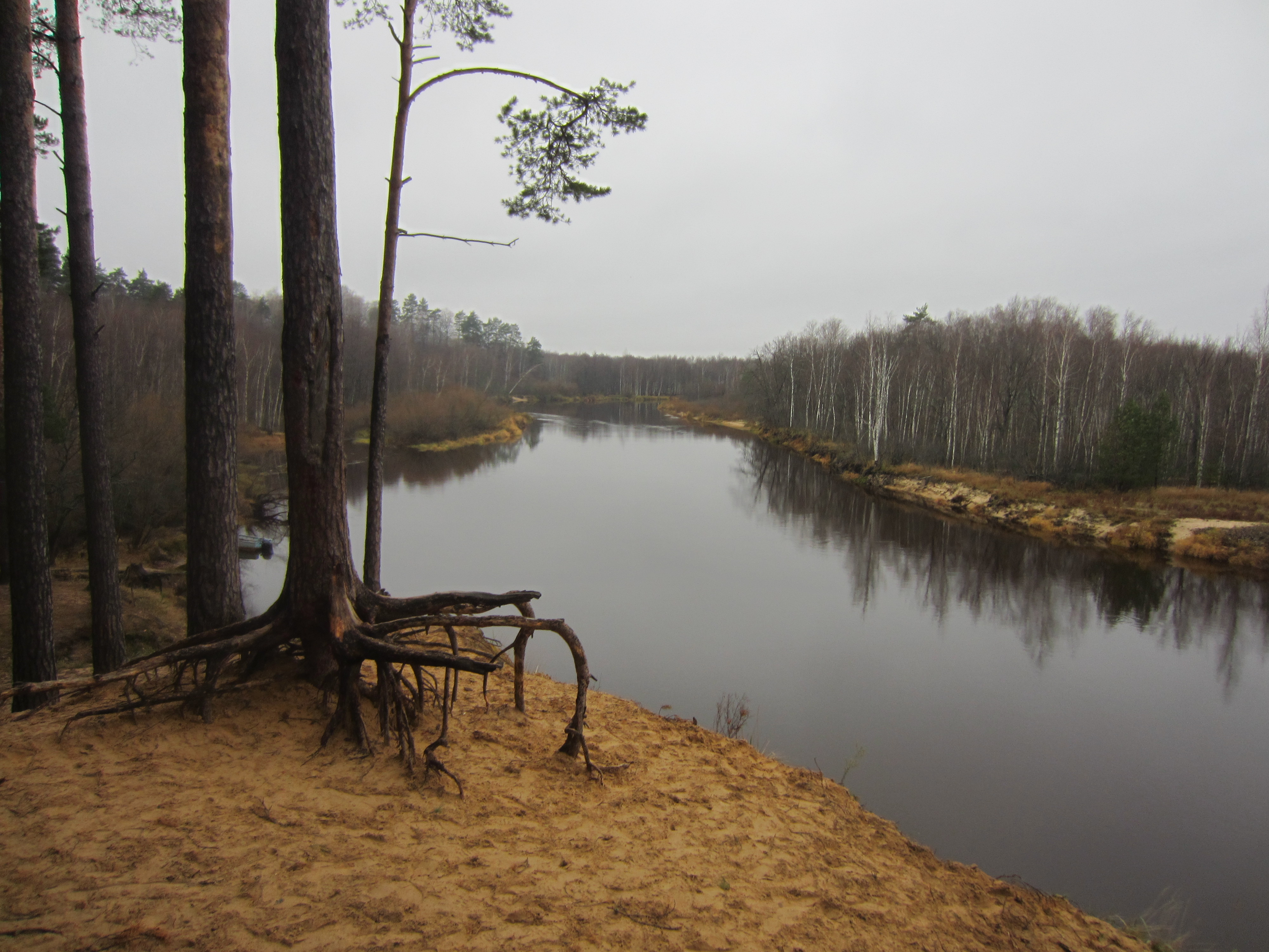 Вид с туристической площадки на реку Пра.